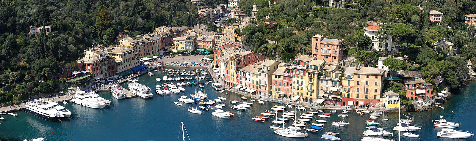 Panorama of Portofino